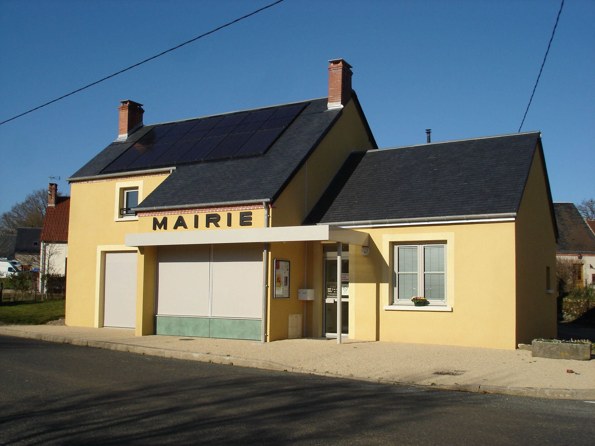 Vigoulant (36) : La mairie.